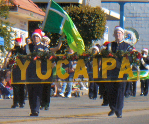 Yucaipa Christmas Parade